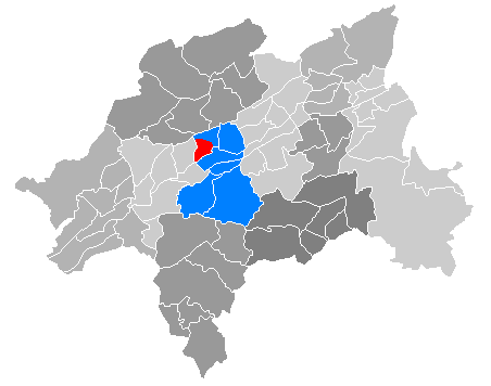 Lage des Wuppertaler Ölbergs in der Stadt selbst erstellt von Pitichinaccio - 02-12-2005